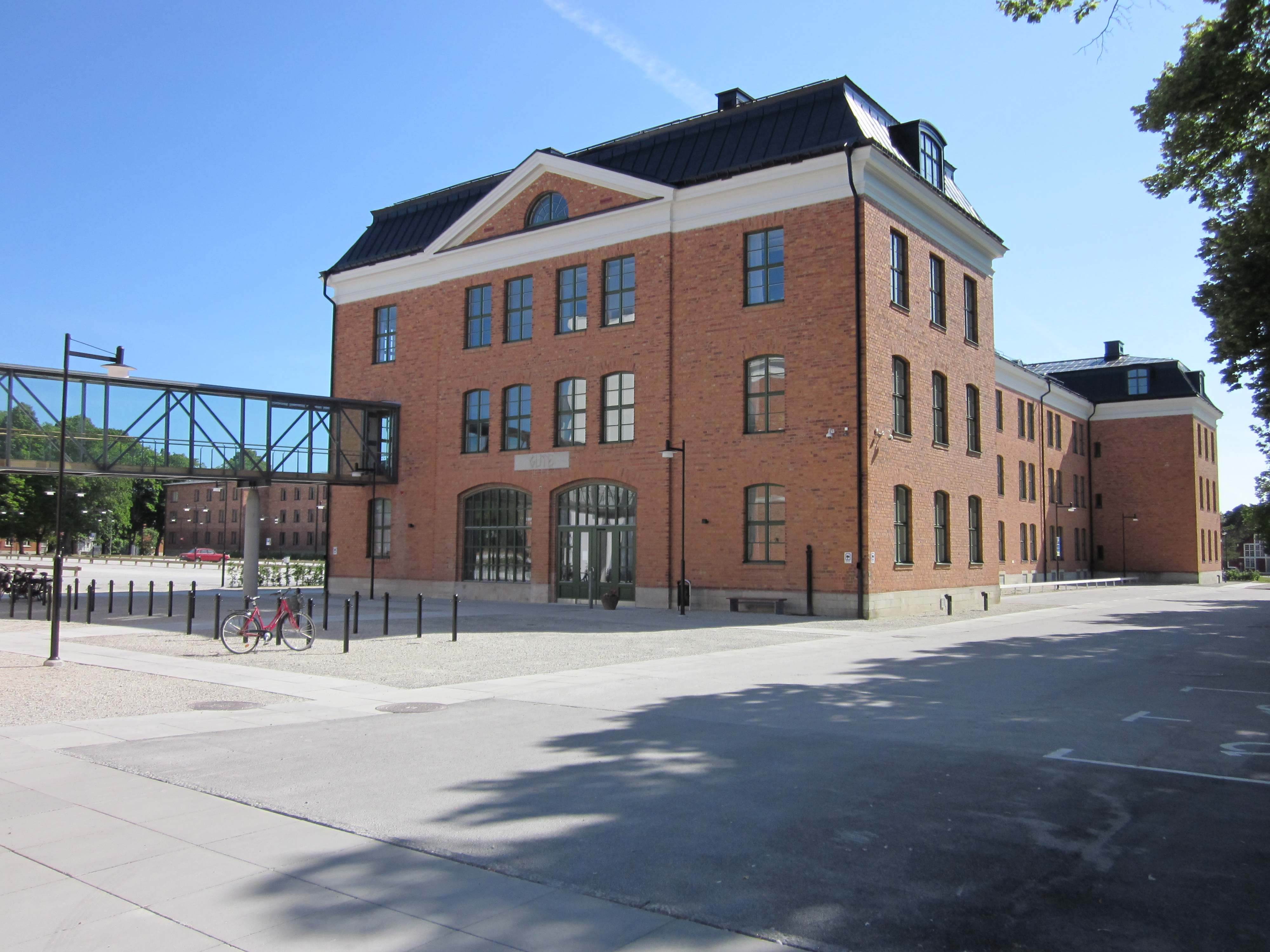 Kasern III "Gute" vid Gotlands regemente, P 18. Uppfört 1905.